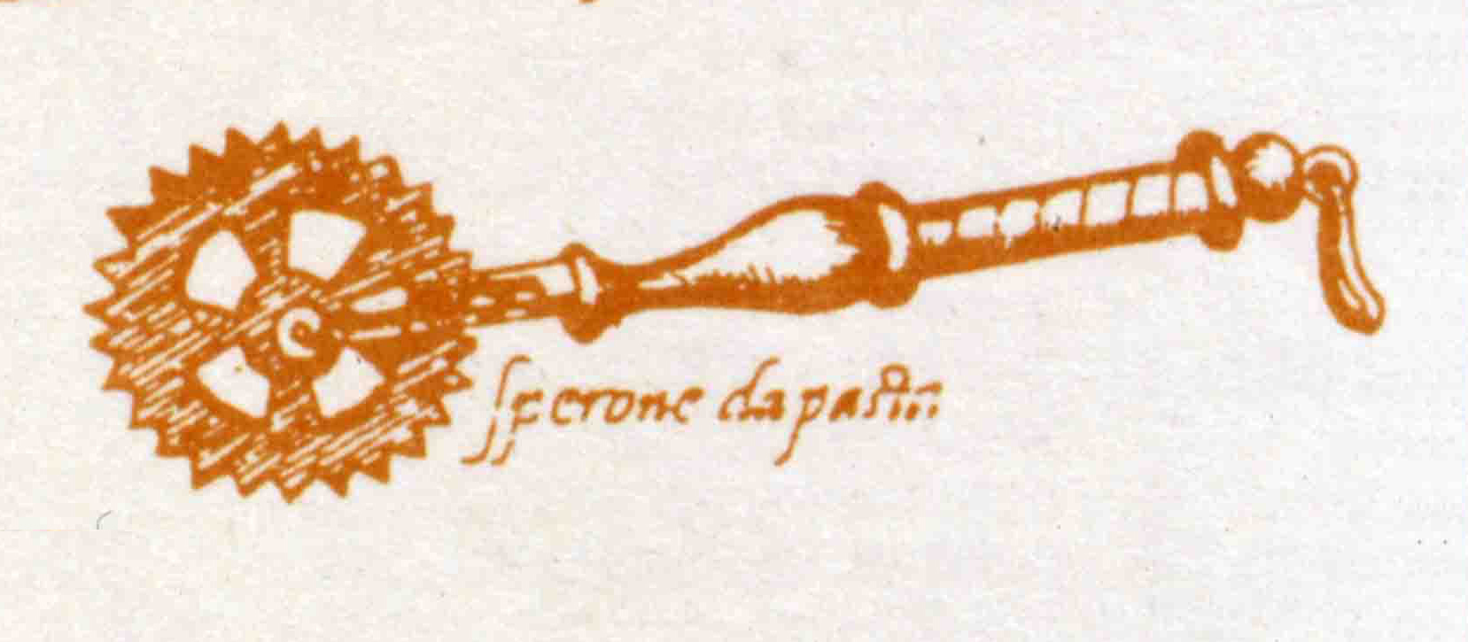 Rotella tagliapasta, particolare di una illustrazione dell'Opera di Bartolomeo Scappi - 1570.